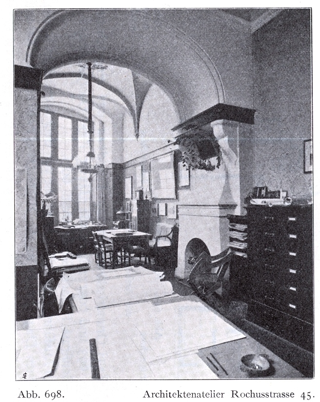 Atelierhaus des Architekten Max Wöhler an der Rochusstraße 45 in Düsseldorf, Atelier von Max Wöhler.jpg